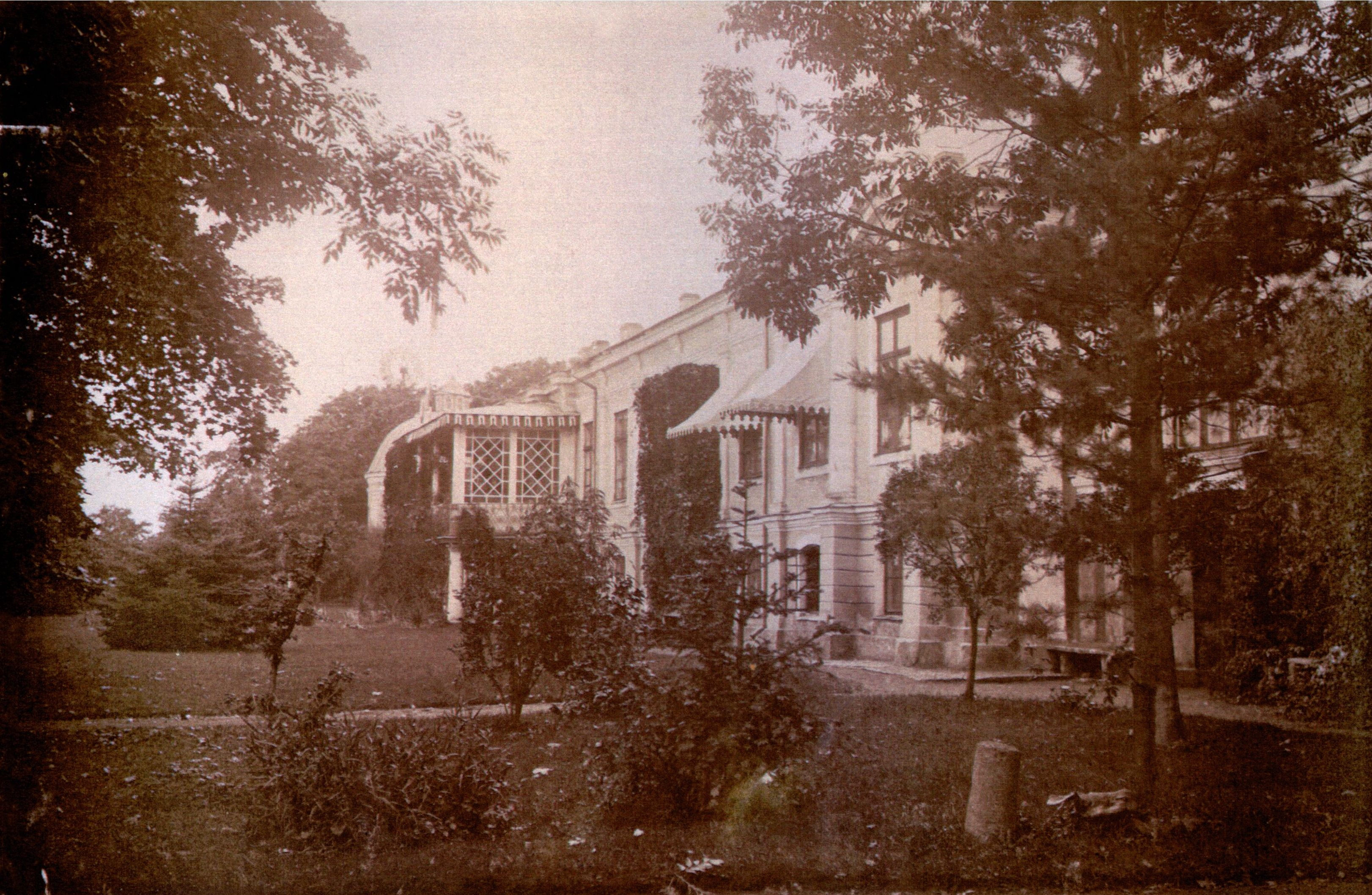 Vääna mõisa härrastemaja 20. sajandi algul.